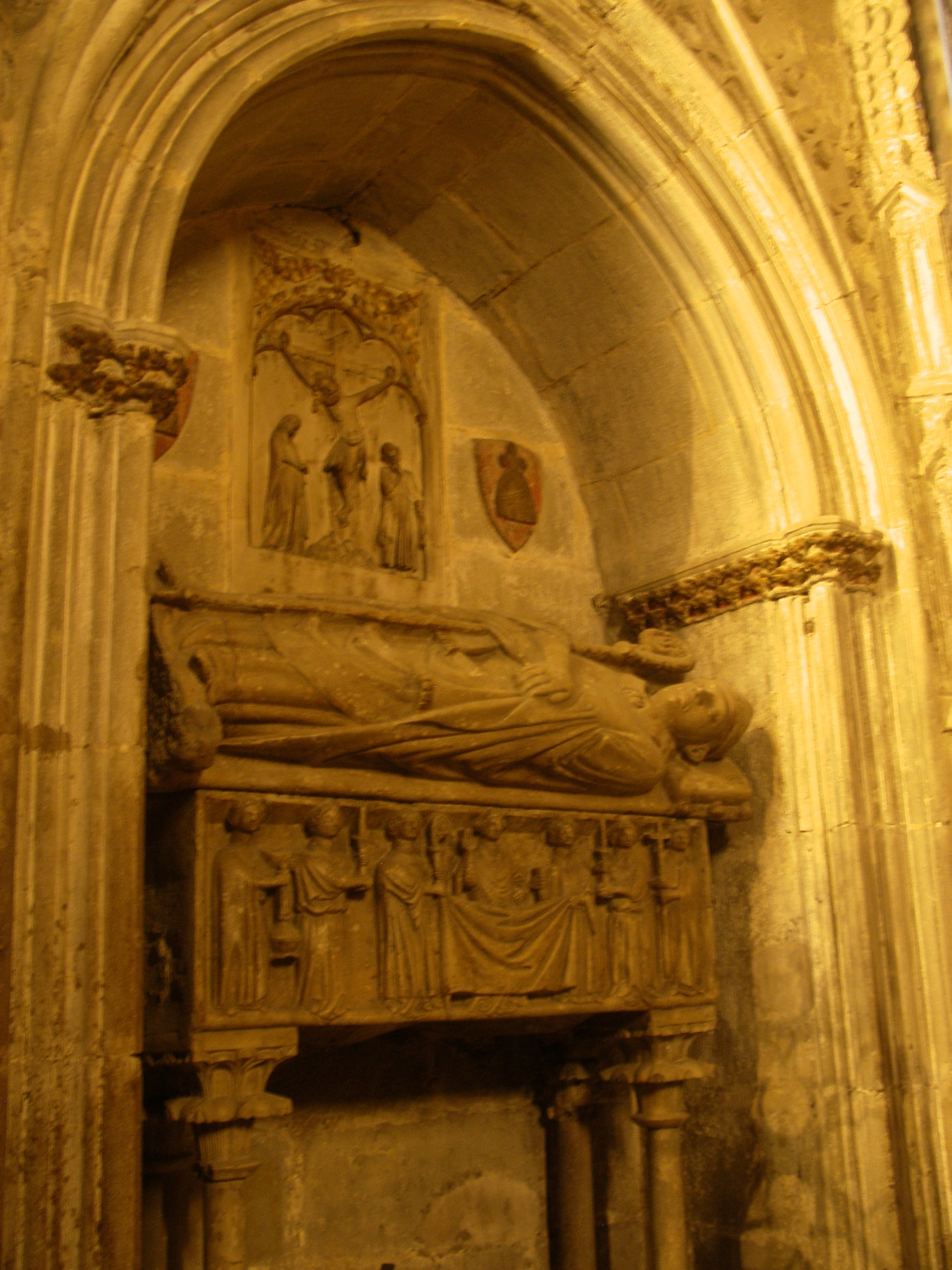 Sepulcre del bisbe Ponç de Gualba, s. XIV, a la Catedral de Barcelona. Calvari de Jaume Cascalls.